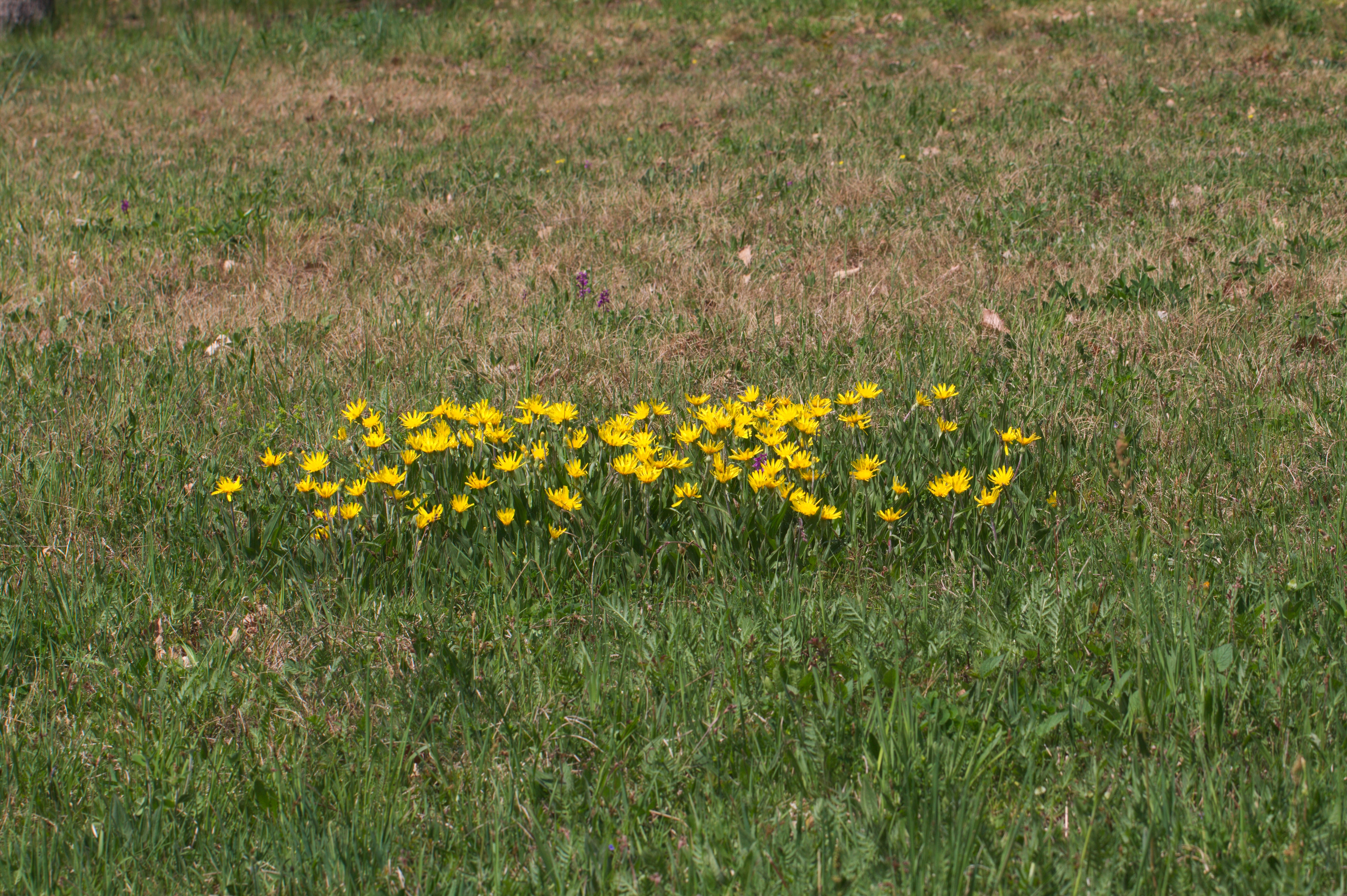 Na Stráži (přírodní památka) - Scorzonera humilis L., hadí mord nízký - status ohrožení v ČR: C3 (ohrožený)